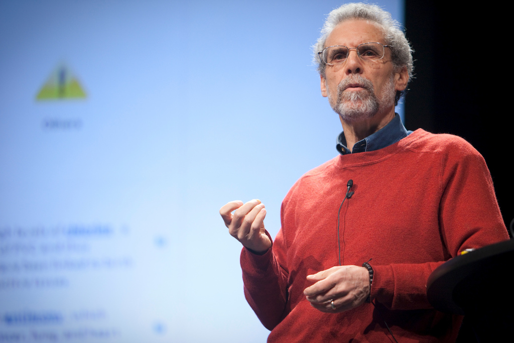 Daniel Goleman psikologoa